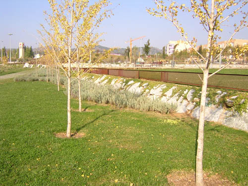 Парк.